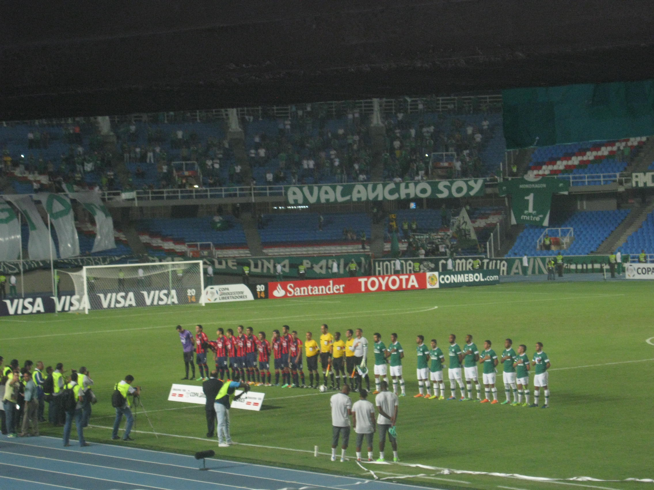 Quinto encuentro entre Deportivo Cali y Cerro Porteño por Copa Libertadores de América